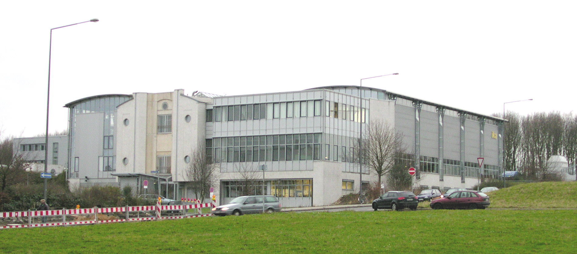 RWTH Aachen, Institut für Kraftfahrwesen